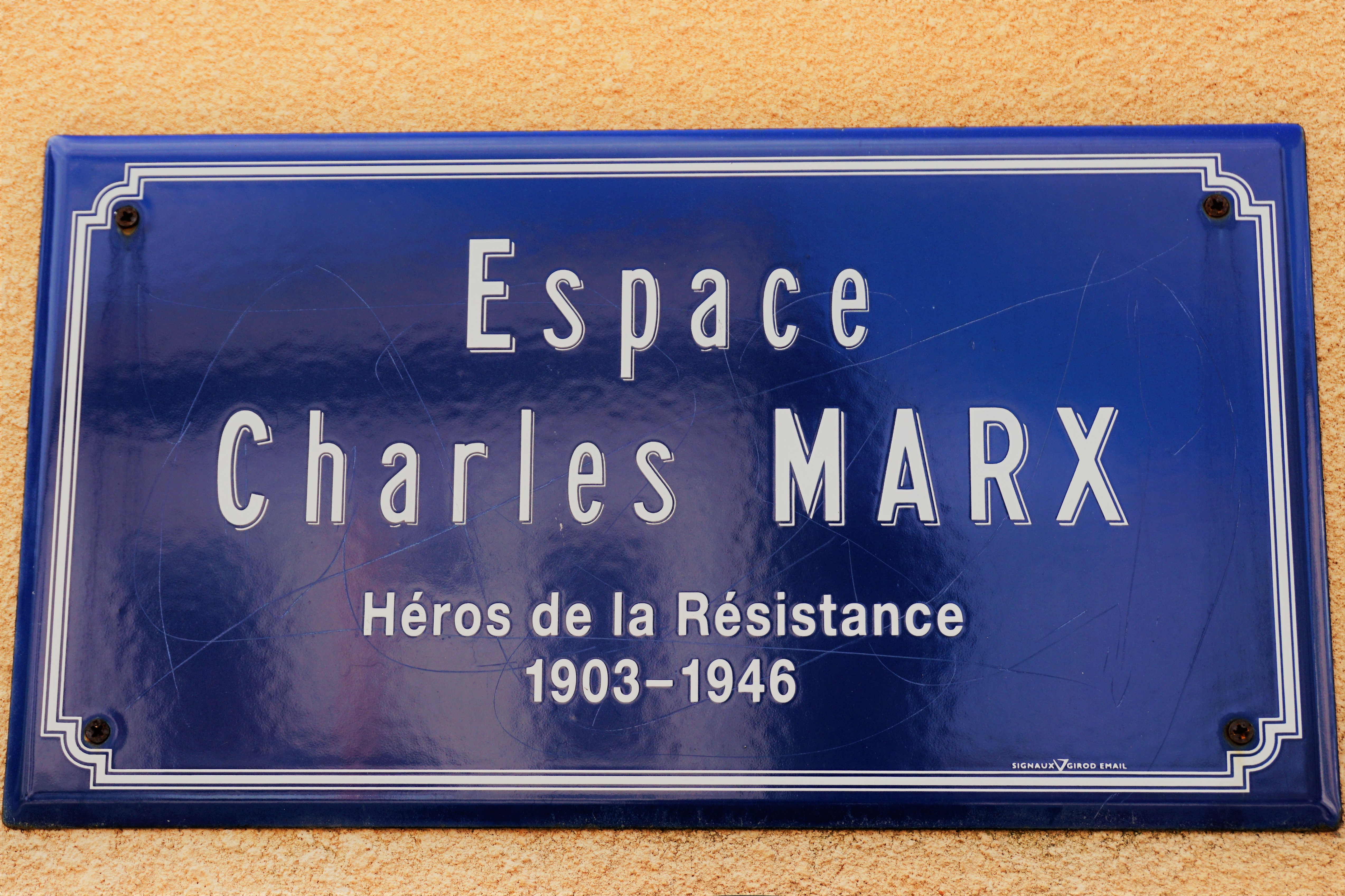 Quillan, Aude, Espace Charles-Marx. En hommage au médecin, résistant et homme politique luxembourgeois (1903-1946.